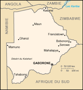 Bostwana